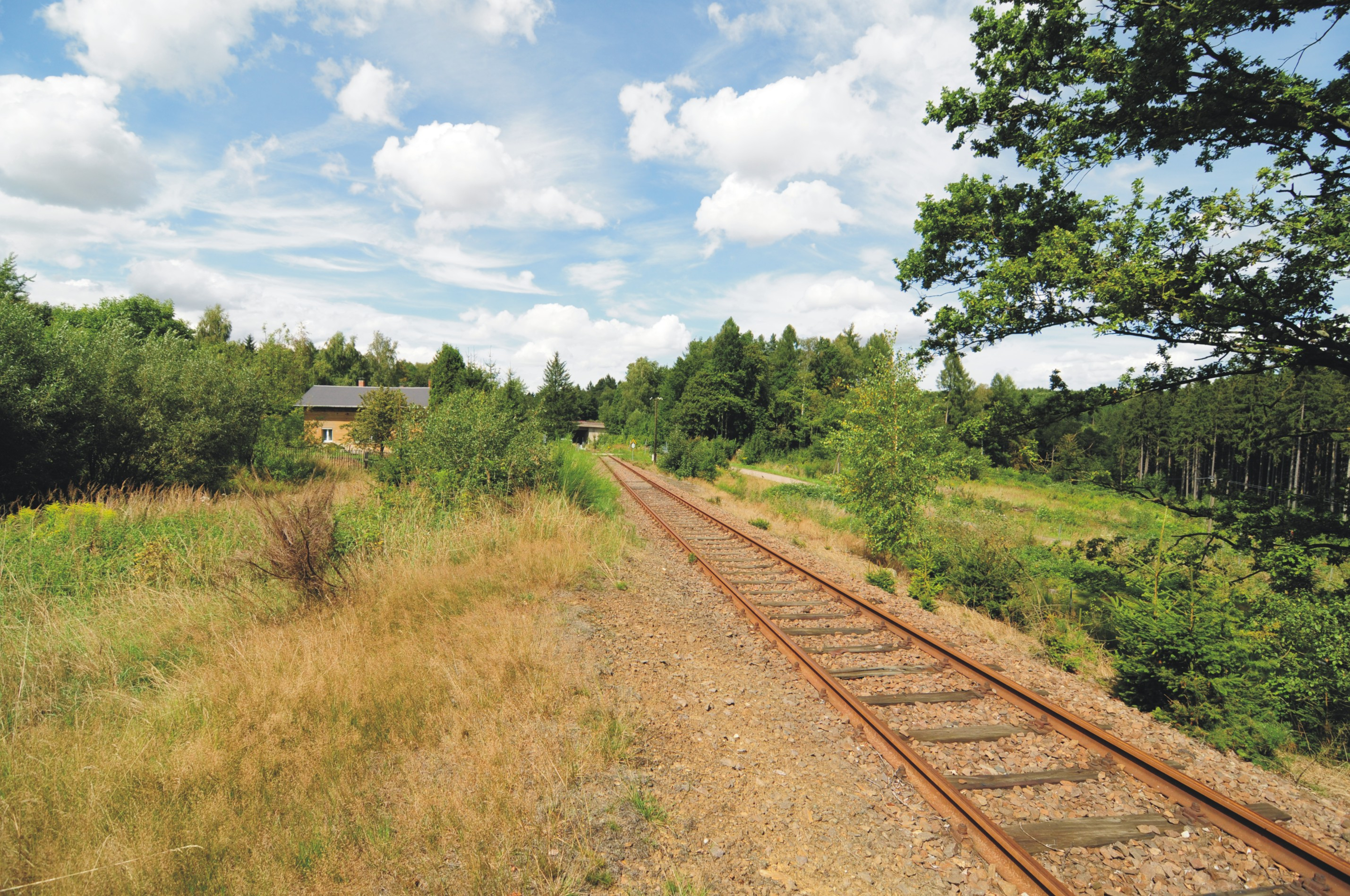 Bahnstrecke Nossen–Moldau, Bahnwärterhaus am Haltepunkt Zellwald (Sachsen, Deutschland)